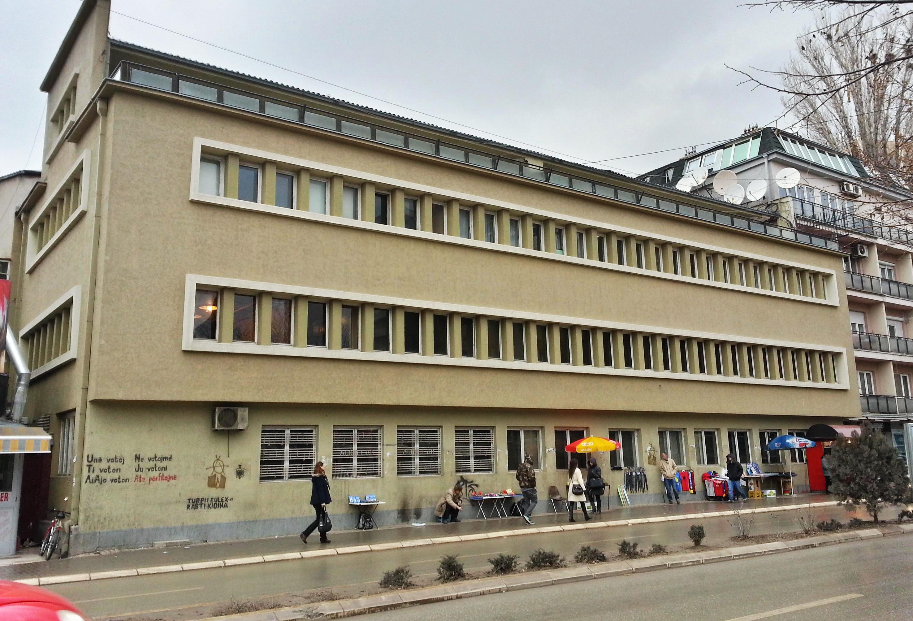 Ndërtesa e departamentit të muzikës së fakultetit të arteve në Prishtinë